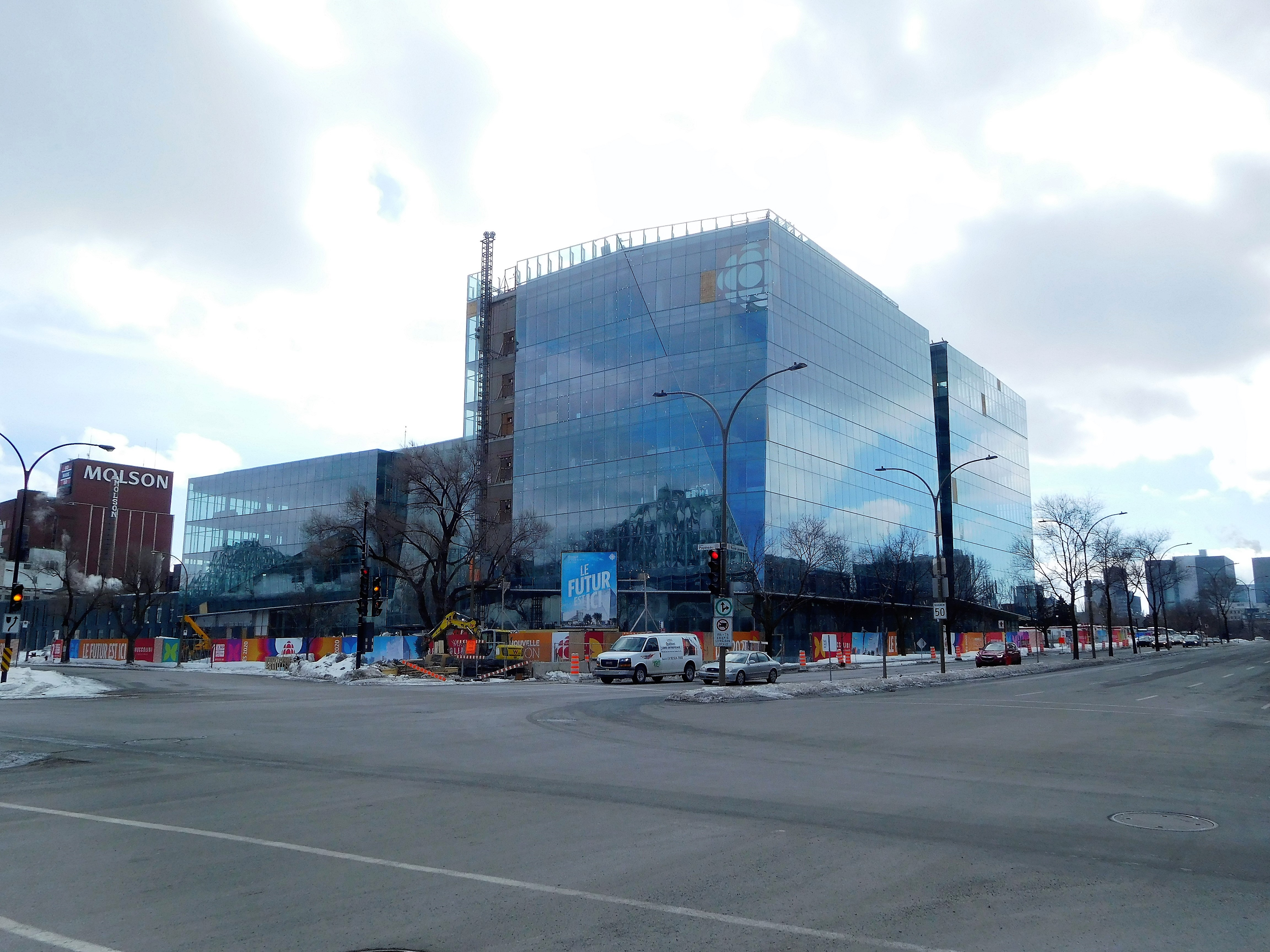 La nouvelle Maison de Radio-Canada, à l'angle du boulevard René-Lévesque et de l'avenue Papineau